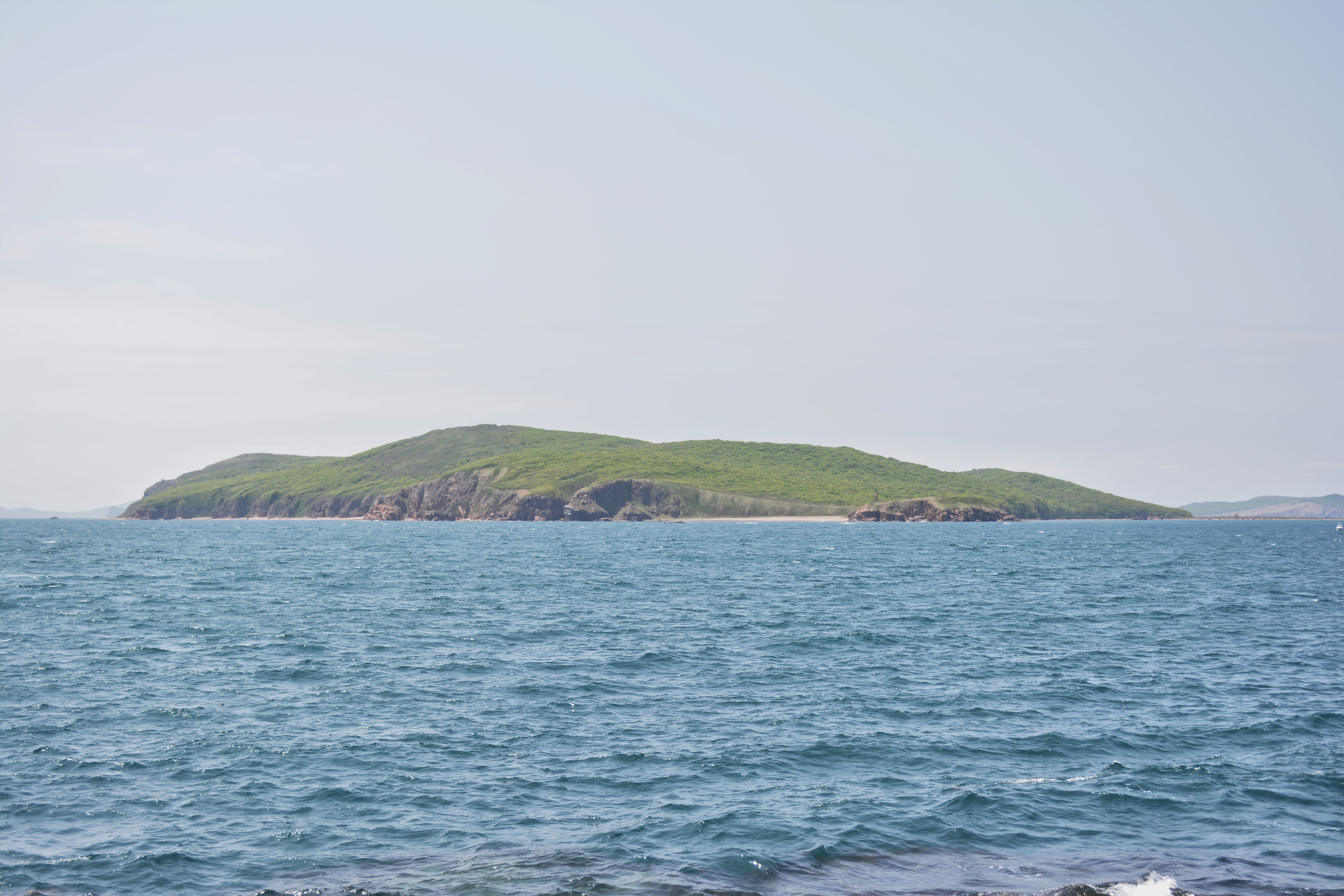 Остров Шкота с мыса Тобизина (Остров Русский, Приморской край)